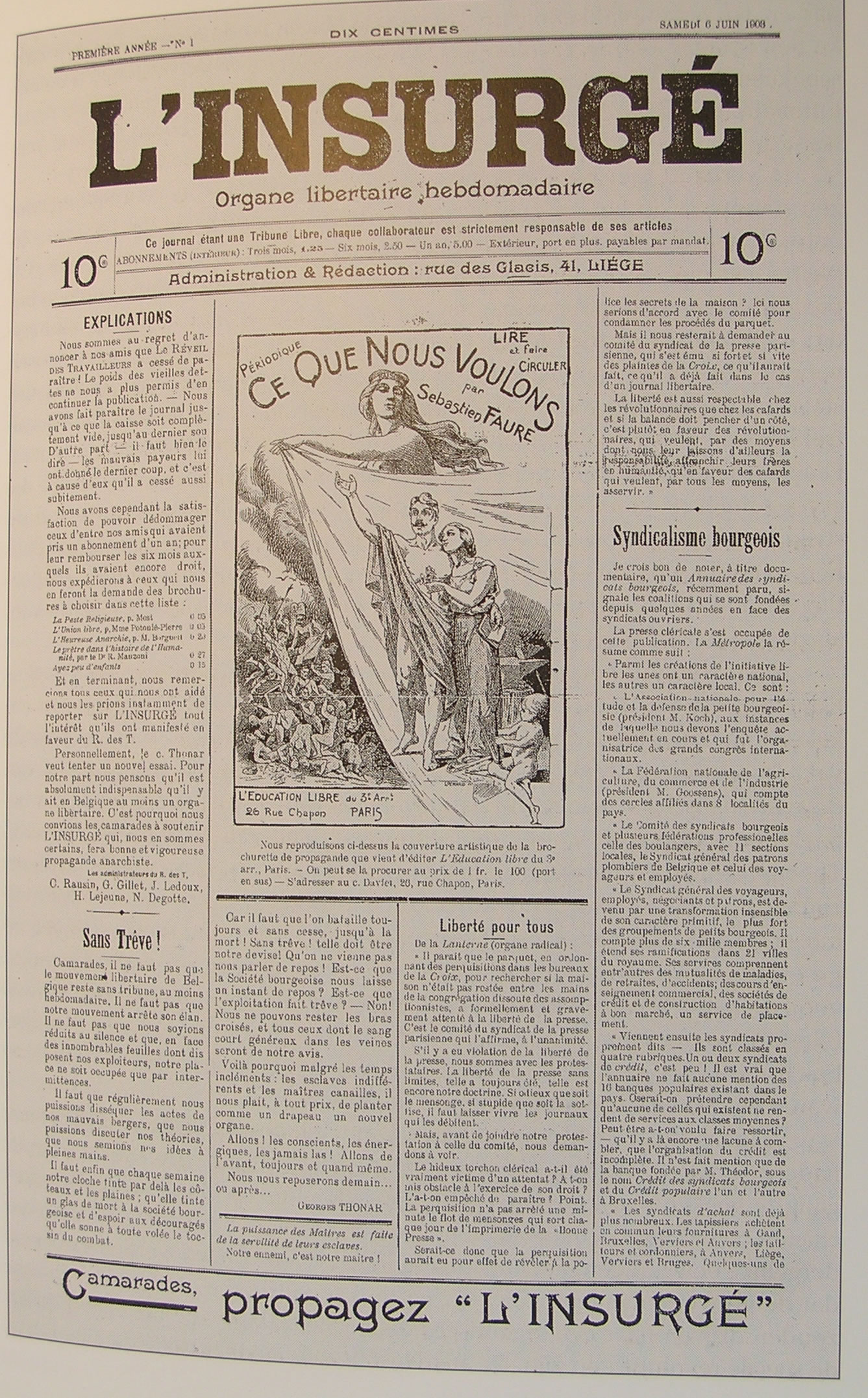 L’Insurgé - journal anarchiste belge - 6 juin 1903 (K.U.L., Centrale Bibliotheek) Bruxelles